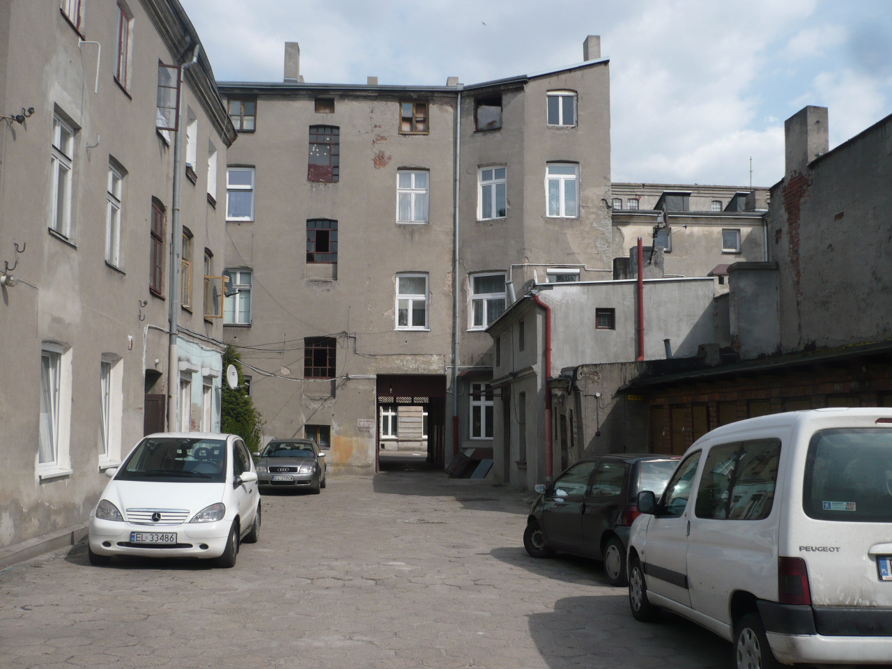 Lody, ul. Dowborczyków 29; tu, w latach ok. 1890-1903 łódzki aptekarz Maurycy Spkorny wraz z Ottonem Tinemannem prowadził wytwórnię środków opatrunkowych, pierwszą w Królestwie Polskim. Widok od podwórka.